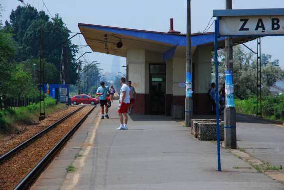 Przystanek kolejowy w Ząbkach.